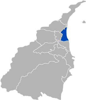 KaurJmeb為編寫中華民國臺灣省宜蘭縣壯圍鄉，於2005年2月7日所繪。